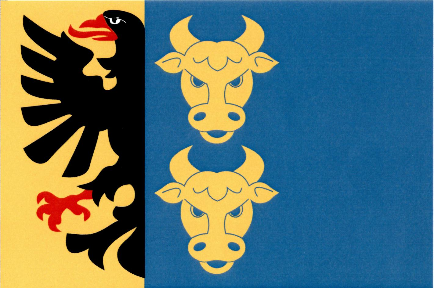 Vlajka obce Tuř